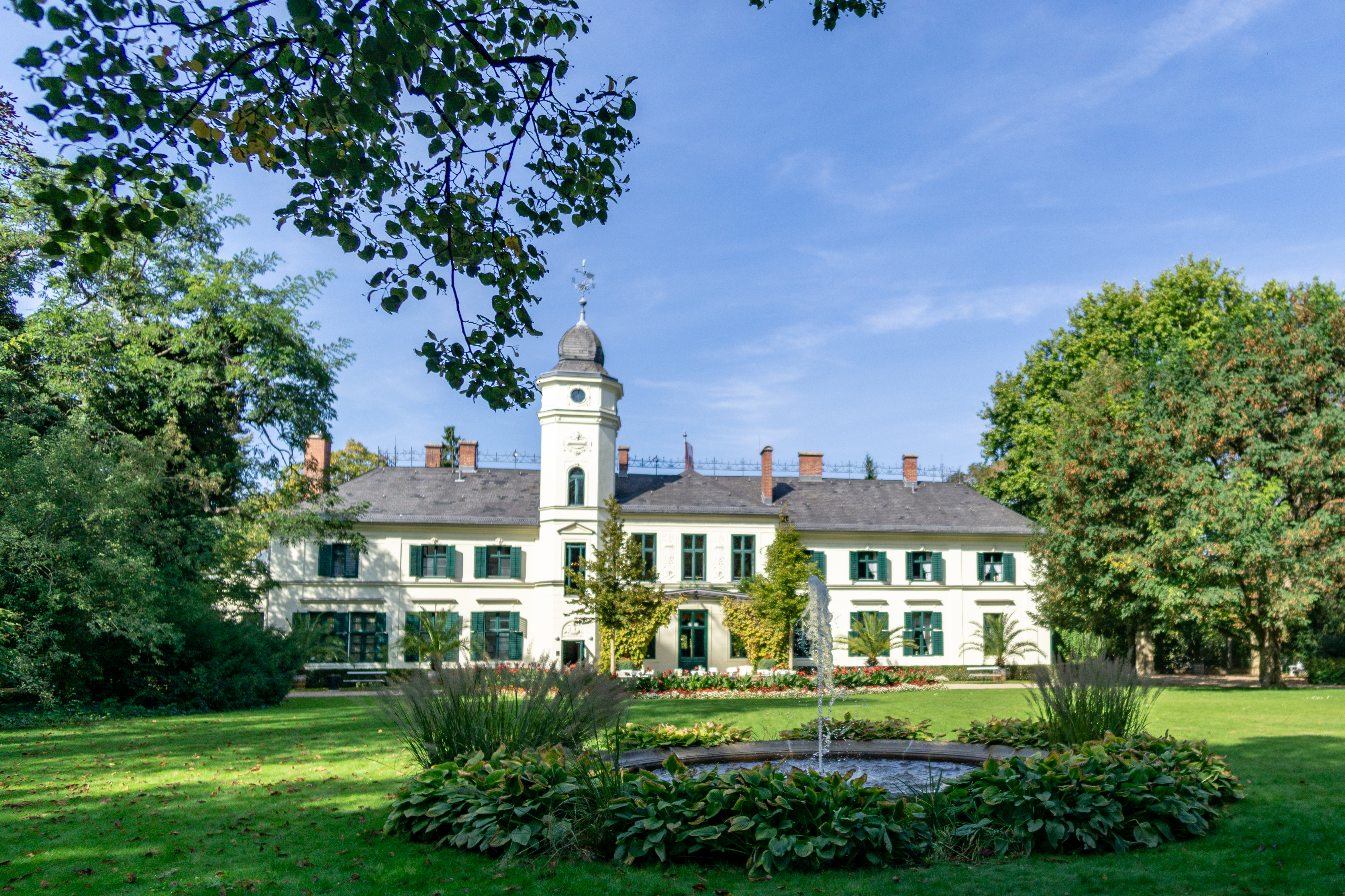 Schloss Britz